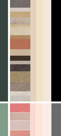 Färg framställt som element av en inkarnat färg.